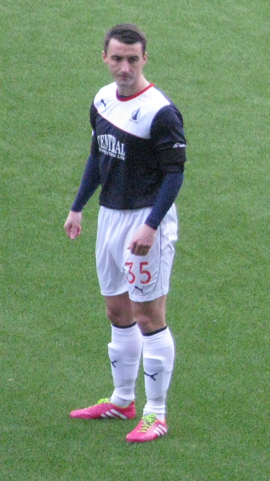 Mark Millar (Falkirk)